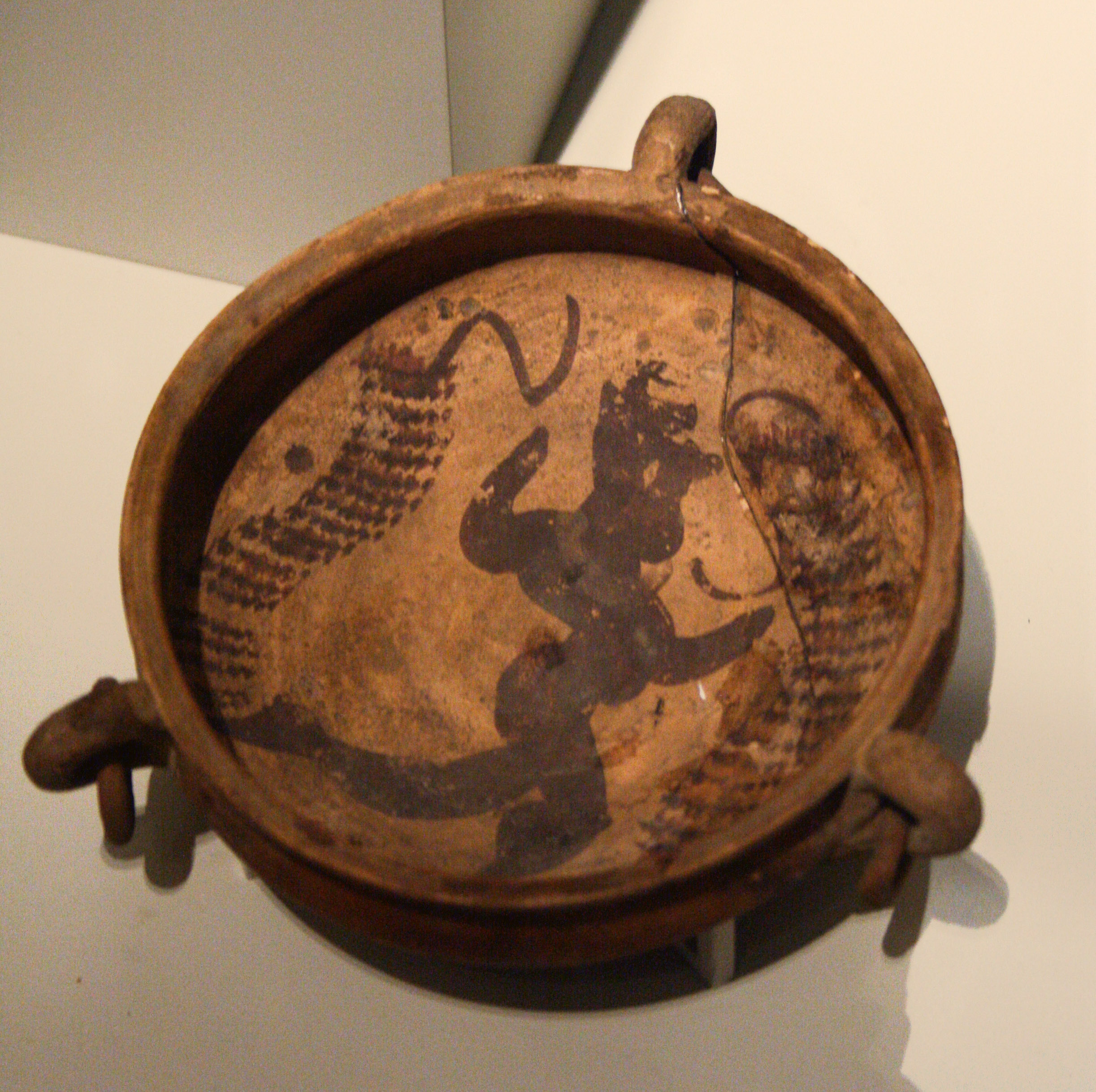 Merotische Keramik aus Faras (heute: Ägyptisches Museum Berlin, Inv. Nr. 12774)